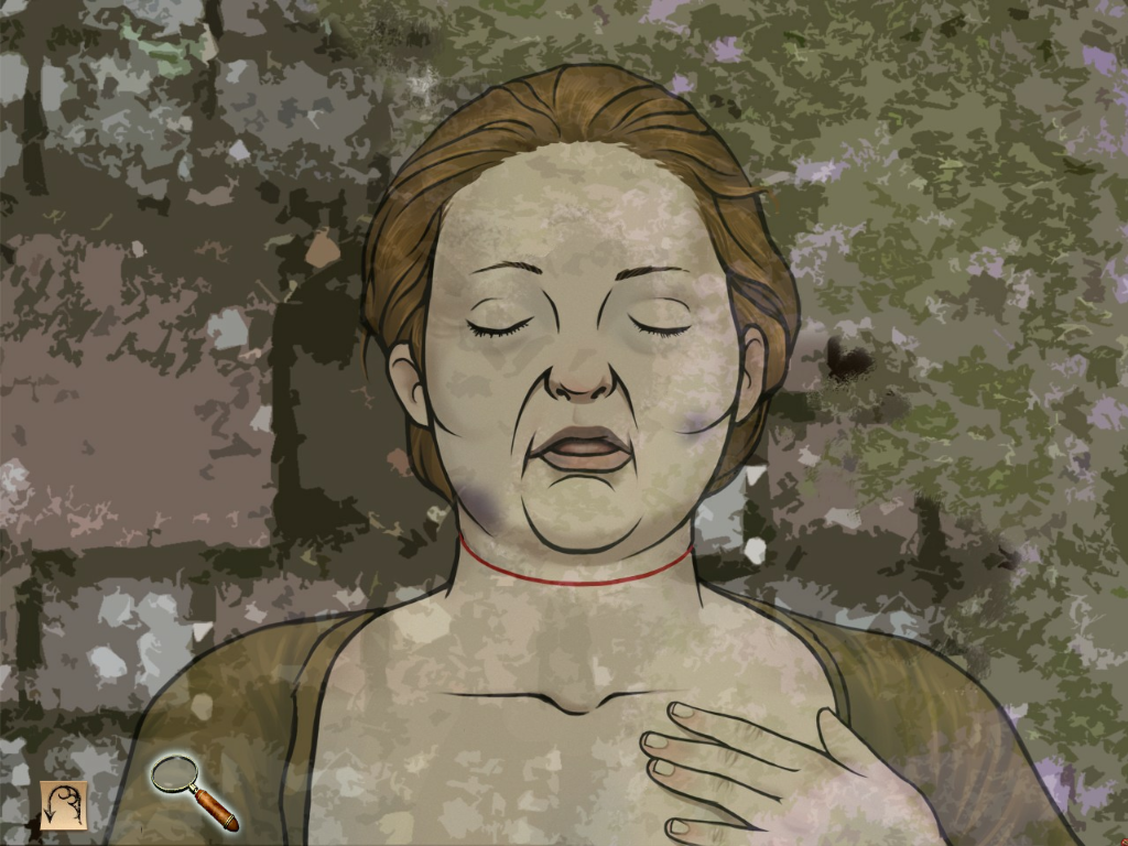 Capture d'écran du jeu Sherlock Holmes contre Jack l'Éventreur. Il s'agit d'un dessin du visage d'Annie Chapman, seconde victime du tueur. Le détective observera plusieurs éléments sur ce visage puis en tirera des déductions sur le tueur.